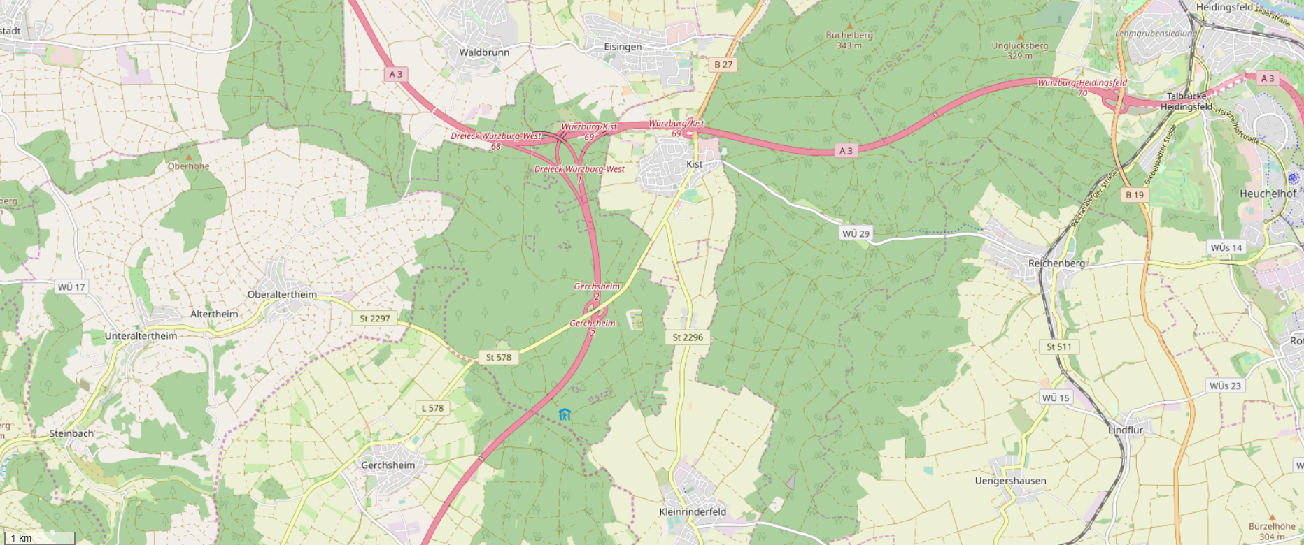 Anschlussstellen 1 (Dreieck Würzburg-West) und 2 (Gerchsheim) der A 81 im Landkreis Würzburg. Die Bundesautobahn 81 verläuft von Würzburg bis Gottmadingen. Mit der Anschlussstelle Gerchsheim (Anschlussstelle 2) gibt es eine Autobahnabfahrt, die jedoch kurioserweise nicht auf der Gemarkung des gleichnamigen Ortsteils Gerchsheim liegt. Die Anschlussstellen Dreieck Würzburg-West (Anschlussstelle 1) und Gerchsheim (Anschlussstelle 2) liegen beide auf der Gemarkung der unterfränkischen Gemeinde Kist im Landkreis Würzburg. Als nächste Anschlussstellen folgen im Main-Tauber-Kreis die Anschlussstellen Tauberbischofsheim (Anschlussstelle 3), Ahorn (Anschlussstelle 4) und Boxberg (Anschlussstelle 5).